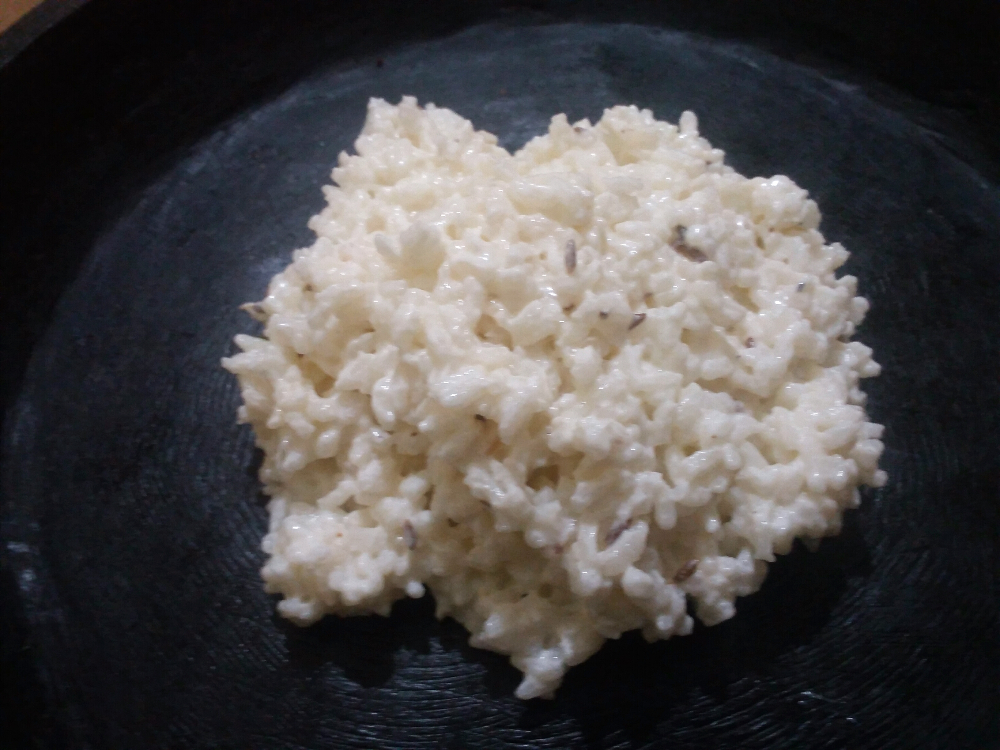 ଓଡ଼ିଆ: ଦହି ଅନ୍ନ